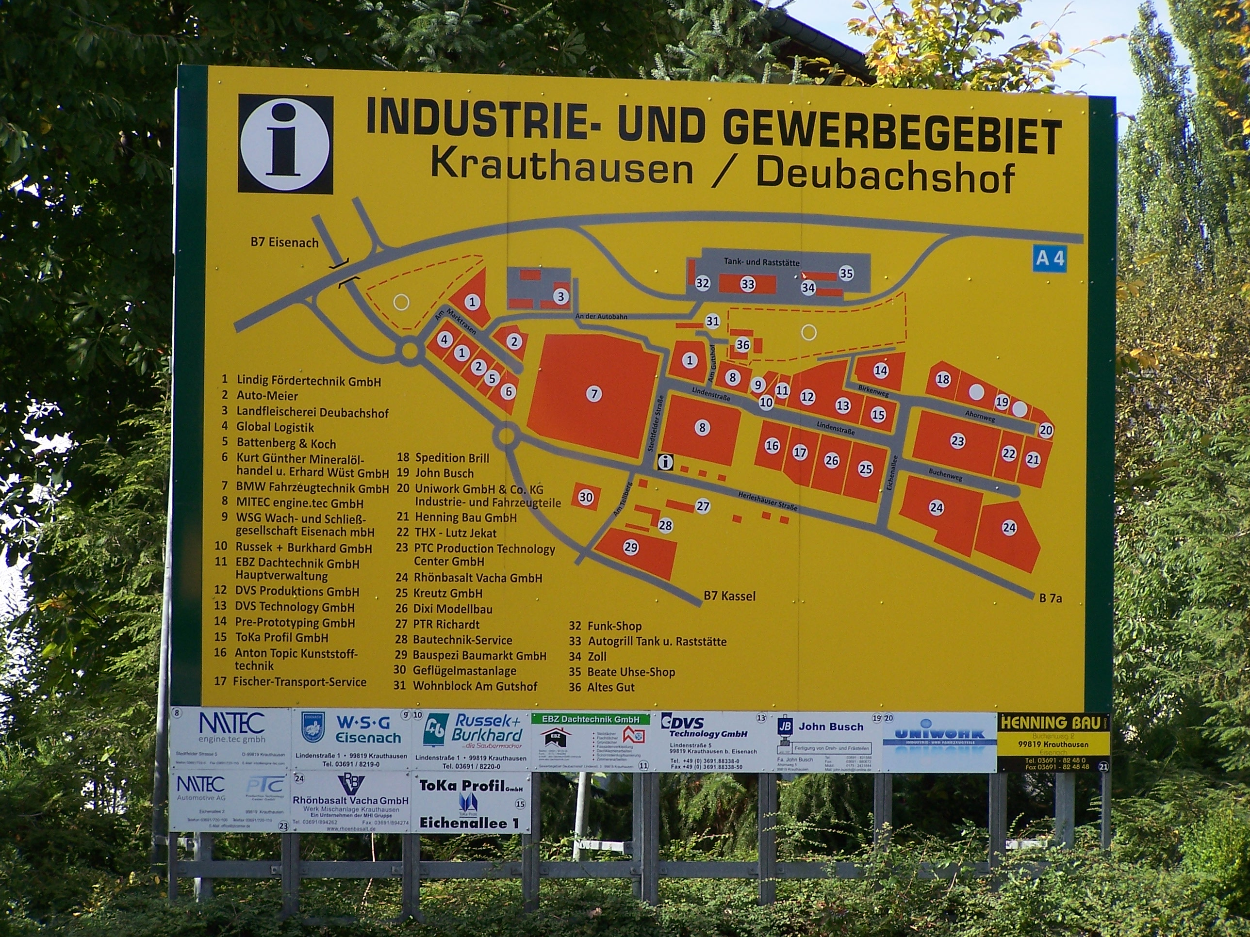 Infotafel am Deubachshof, Industriegebiet Krauthausen.